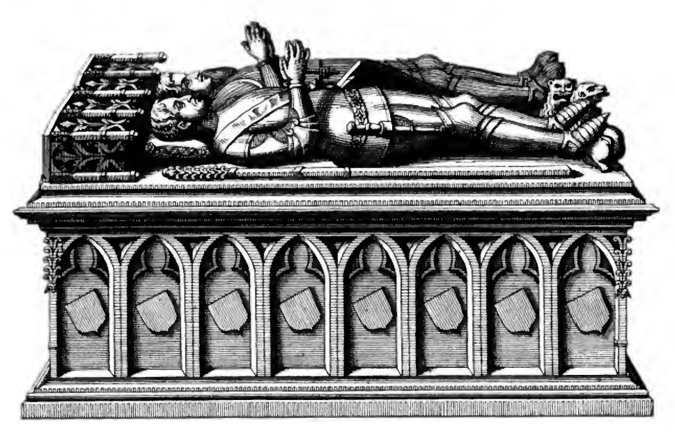 Ce tombeau, élevé par René II pour ses prédécesseurs, se trouvait dans la collégiale Saint-Georges de Nancy.